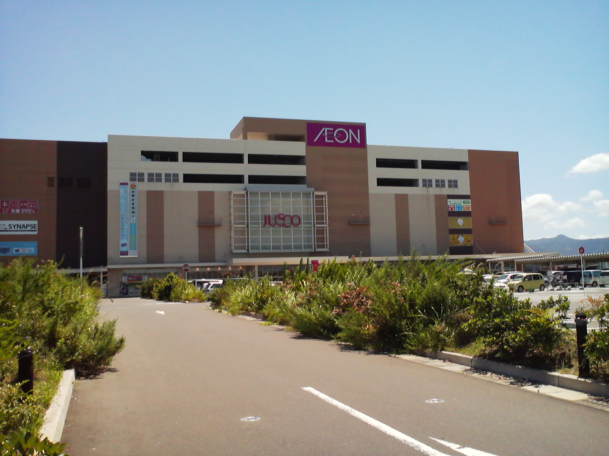 イオン鹿児島ショッピングセンターの外観